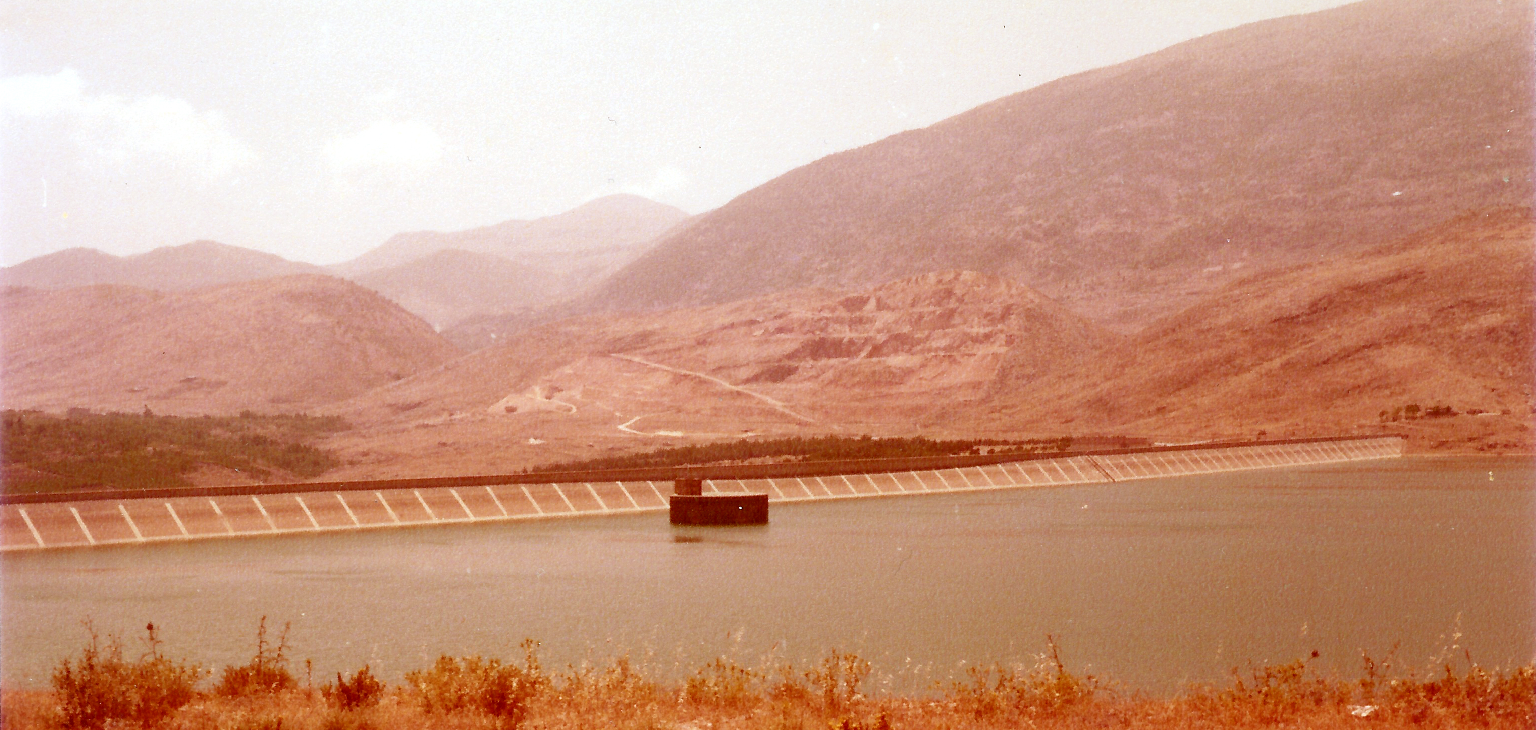 Lake Qaraoun, Lebanon